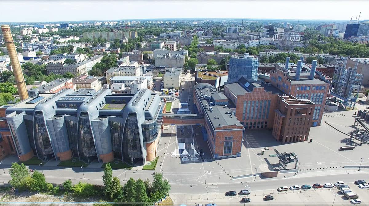 Panorama na kompleks budynków EC1